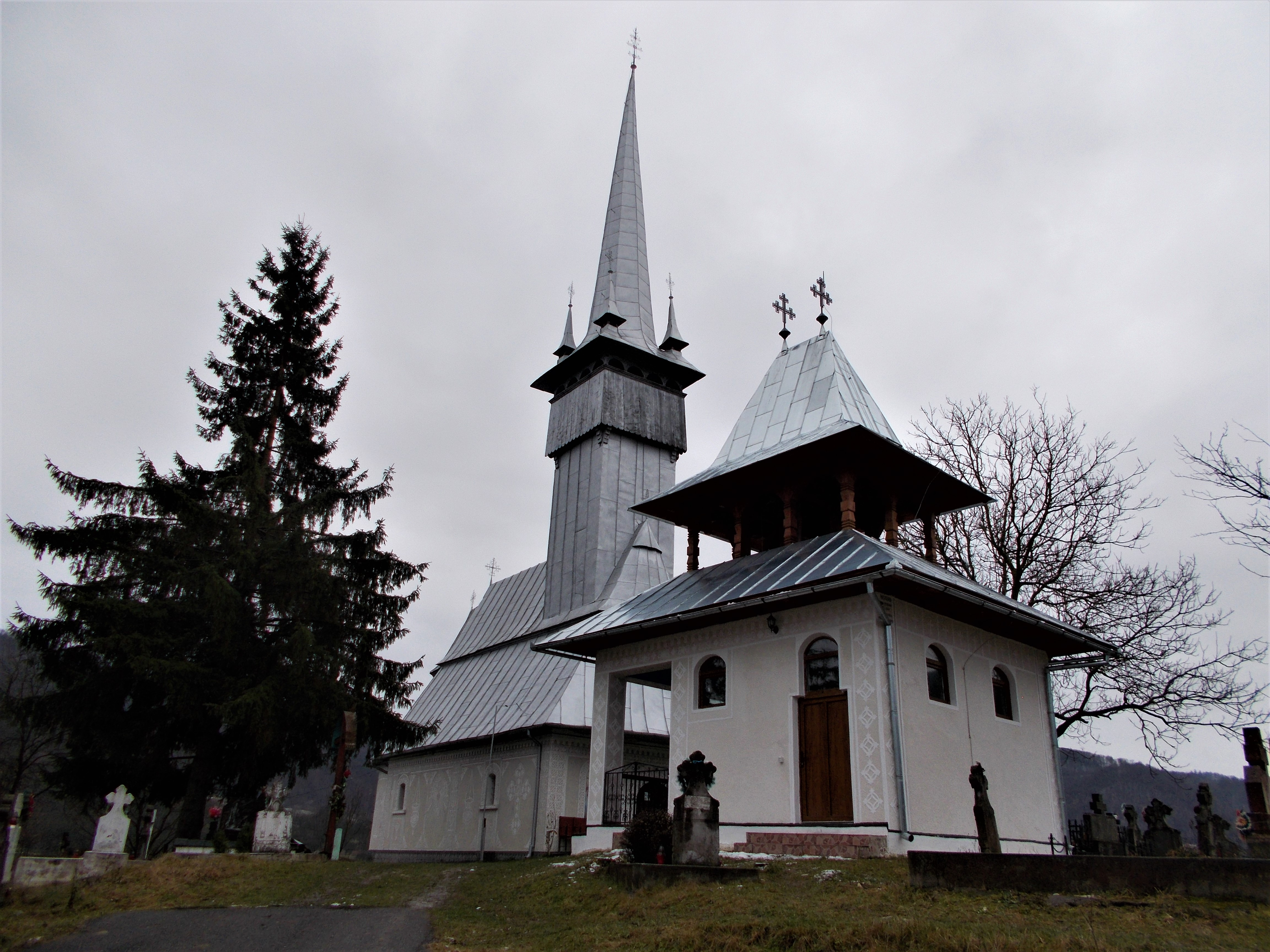 Biserica de piatră „Nașterea Sfintei Maria” din Vălenii Lăpușului, județul Maramureș